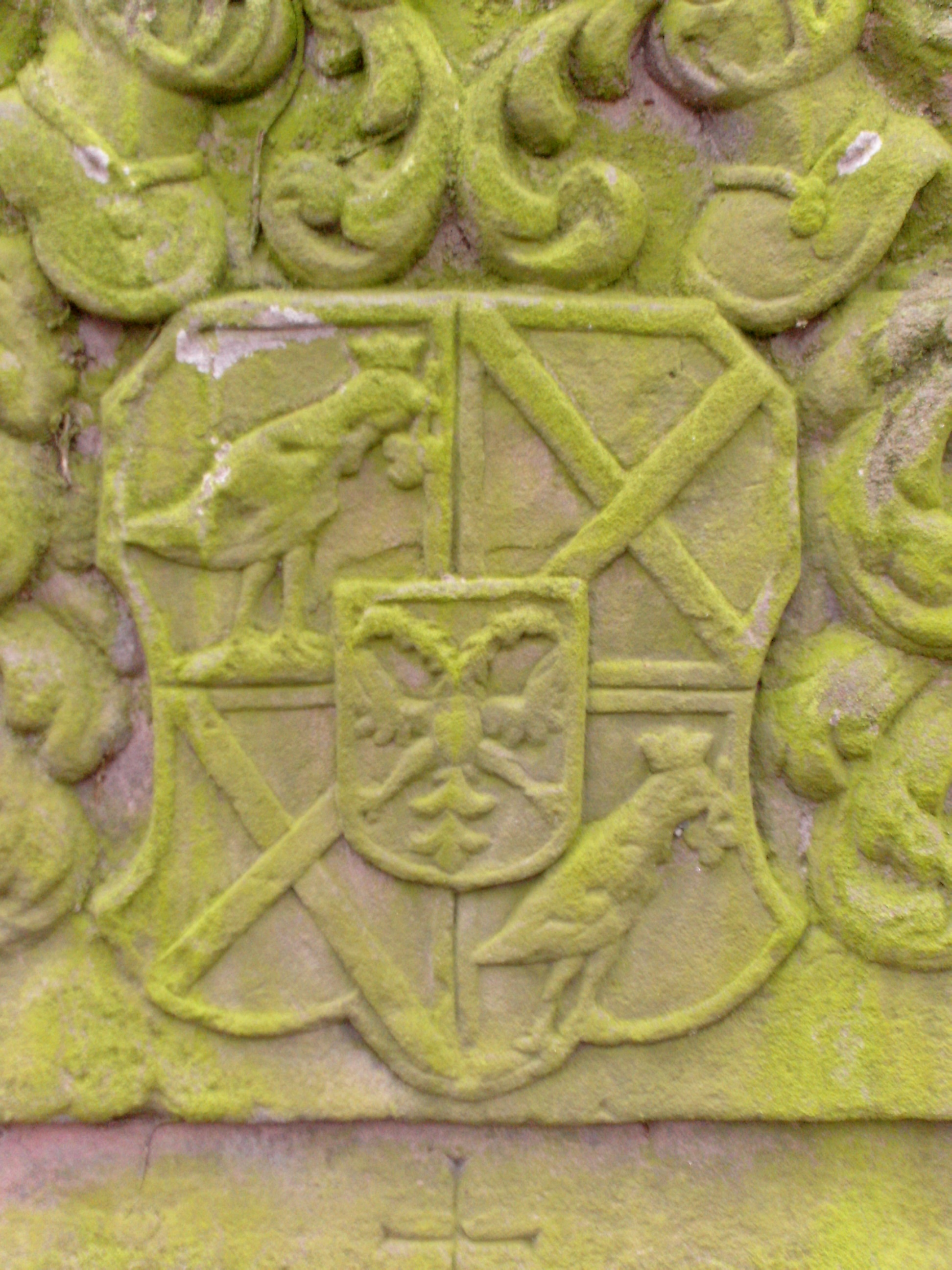 Jakob von Tullian, bischöflicher Amtmann in Dirmstein, Grabstein 1729, Wappen